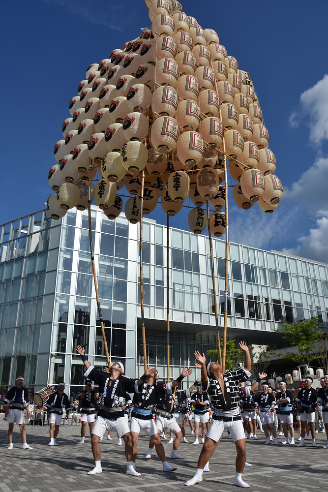 秋田市 オープンデータより